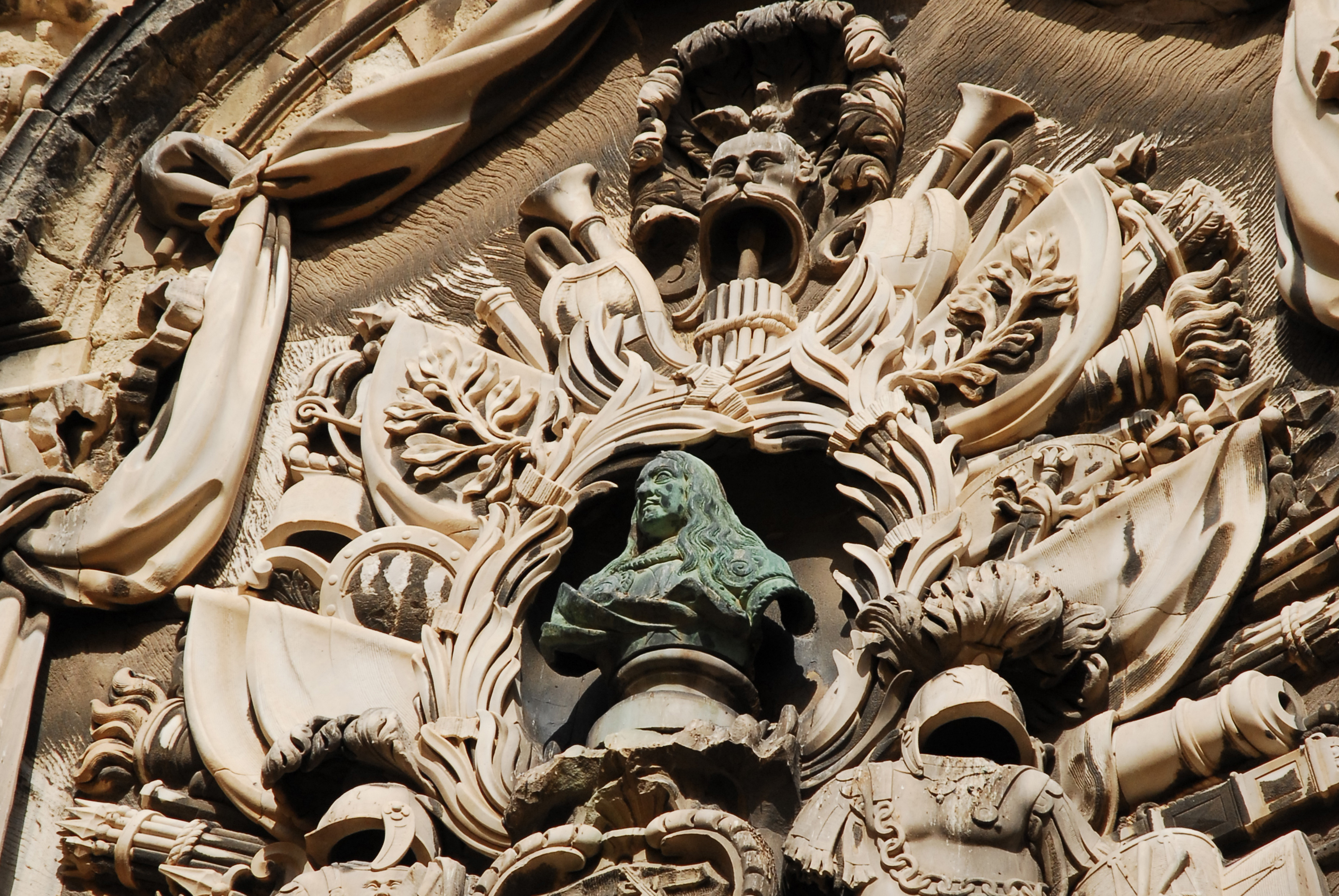 Relief of Grandmaster Gregorio Carafa at Auberge d'Italie, Valletta, Malta